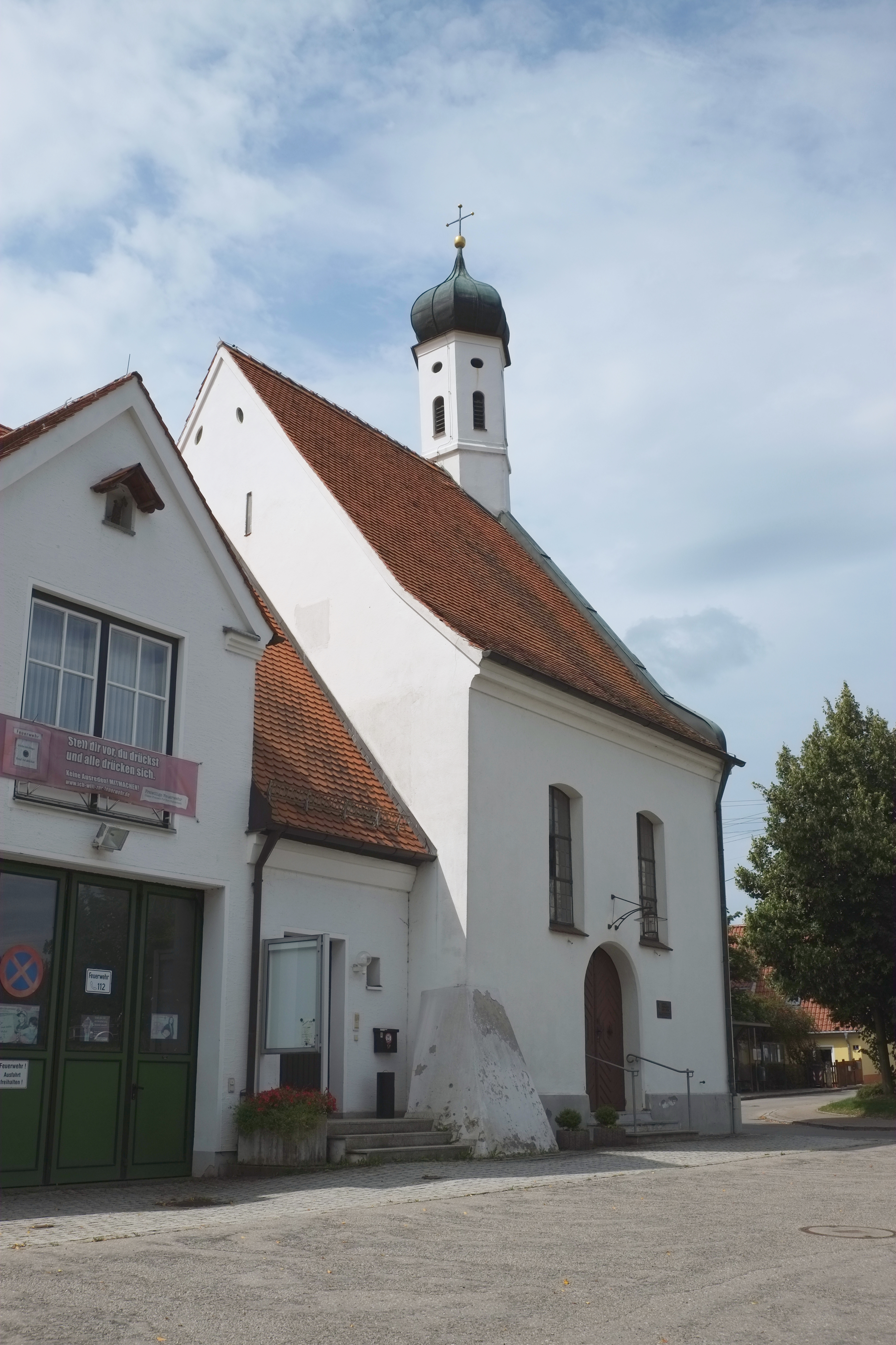 Kapelle St. Nikolaus von Tolentino in Schlipsheim, einem Ortsteil von Neusäß im Landkreis Augsburg (Bayern, Deutschland)